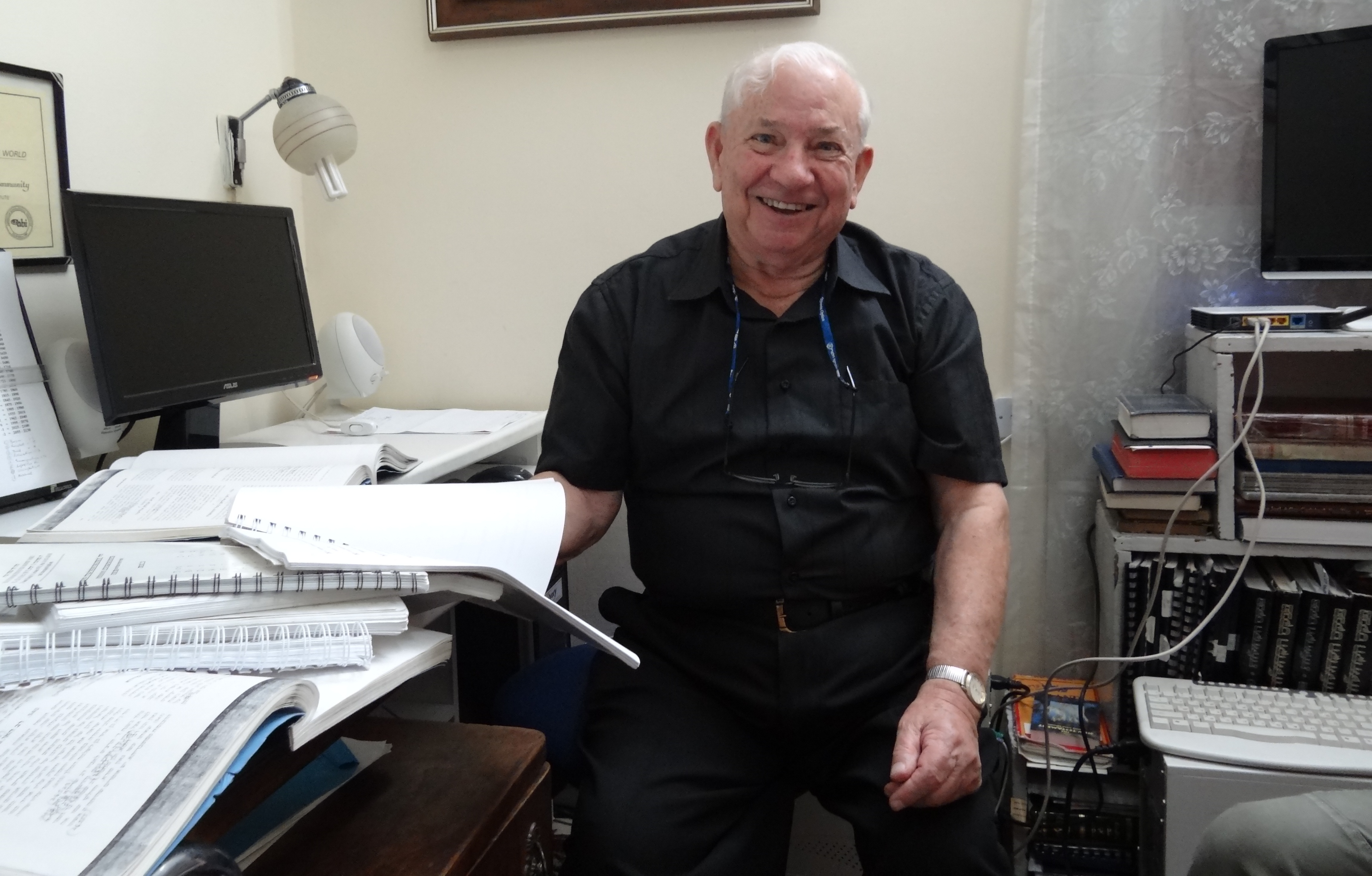 Chanan Rapaportת Psychologist from Israel חנן רפפורט, הקים בשנת 1951 ביחד עם אליקים העצני את "שורת התנדבים" היה מנהלו של מכון הנרייטה סולד ויועץ לגולדה מאיר ויצחק רבין